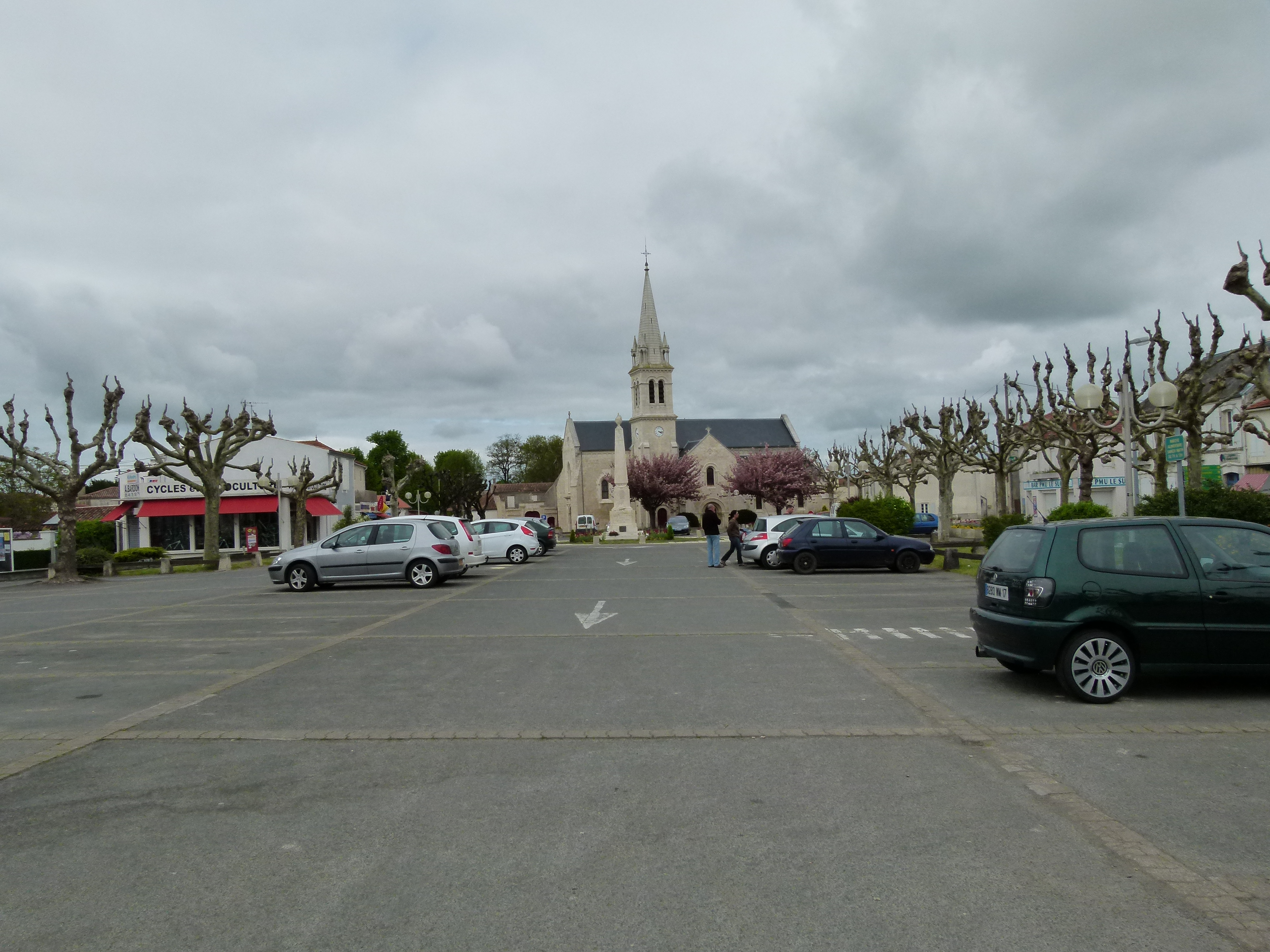 La Place de la République à Aigrefeuille-d'Aunis